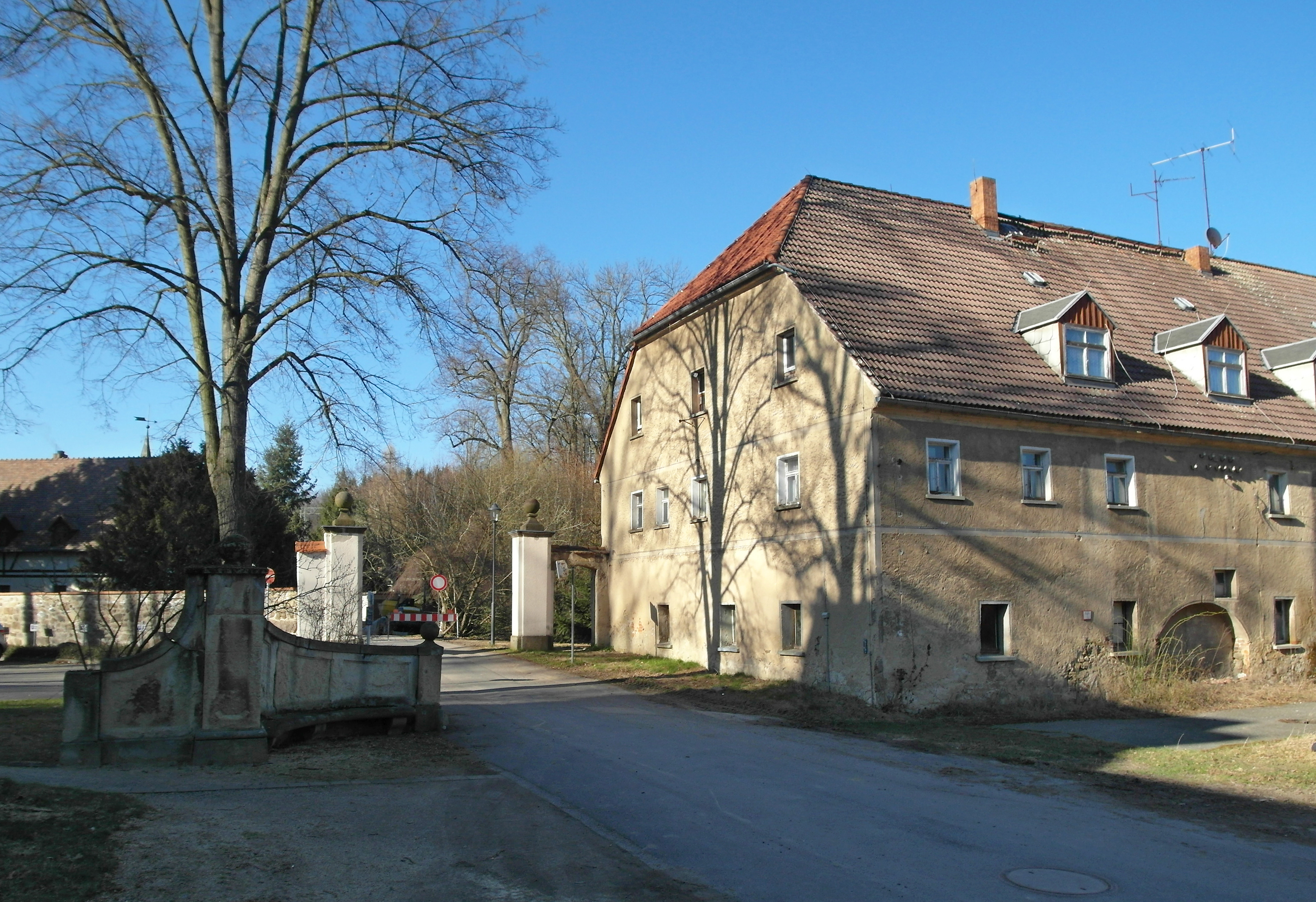 27.03.2017 02742 Friedersdorf (Neusalza-Spremberg) Rittergut NiederFriedersdorf. Altes Herrenhaus, Am Pflegeheim 1 (GMP: 51.033779,14.551729). Sicht von Südwesten. [SAM9048.JPG]20170327540DR.JPG(c)Blobelt